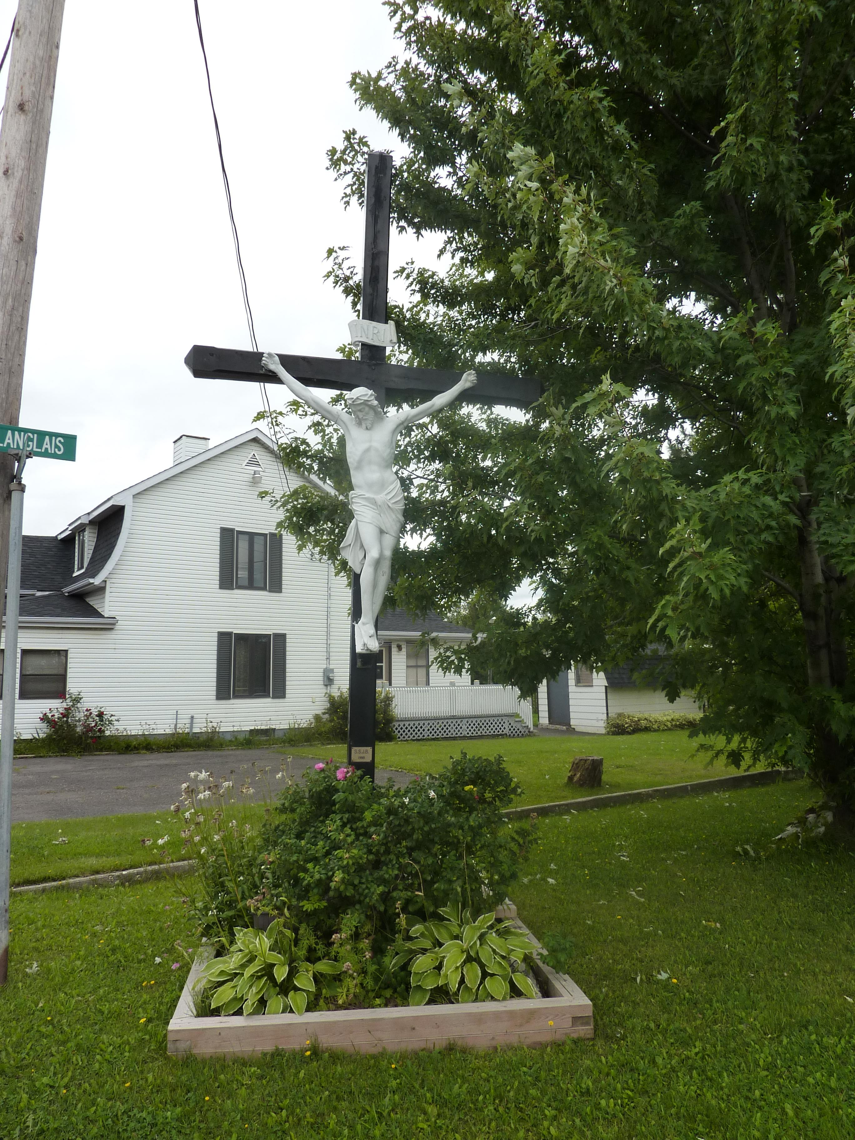 Croix de chemin à l'intersection de la route de la Vallée et de la route Langlais à Sainte-Angèle-de-Mérici